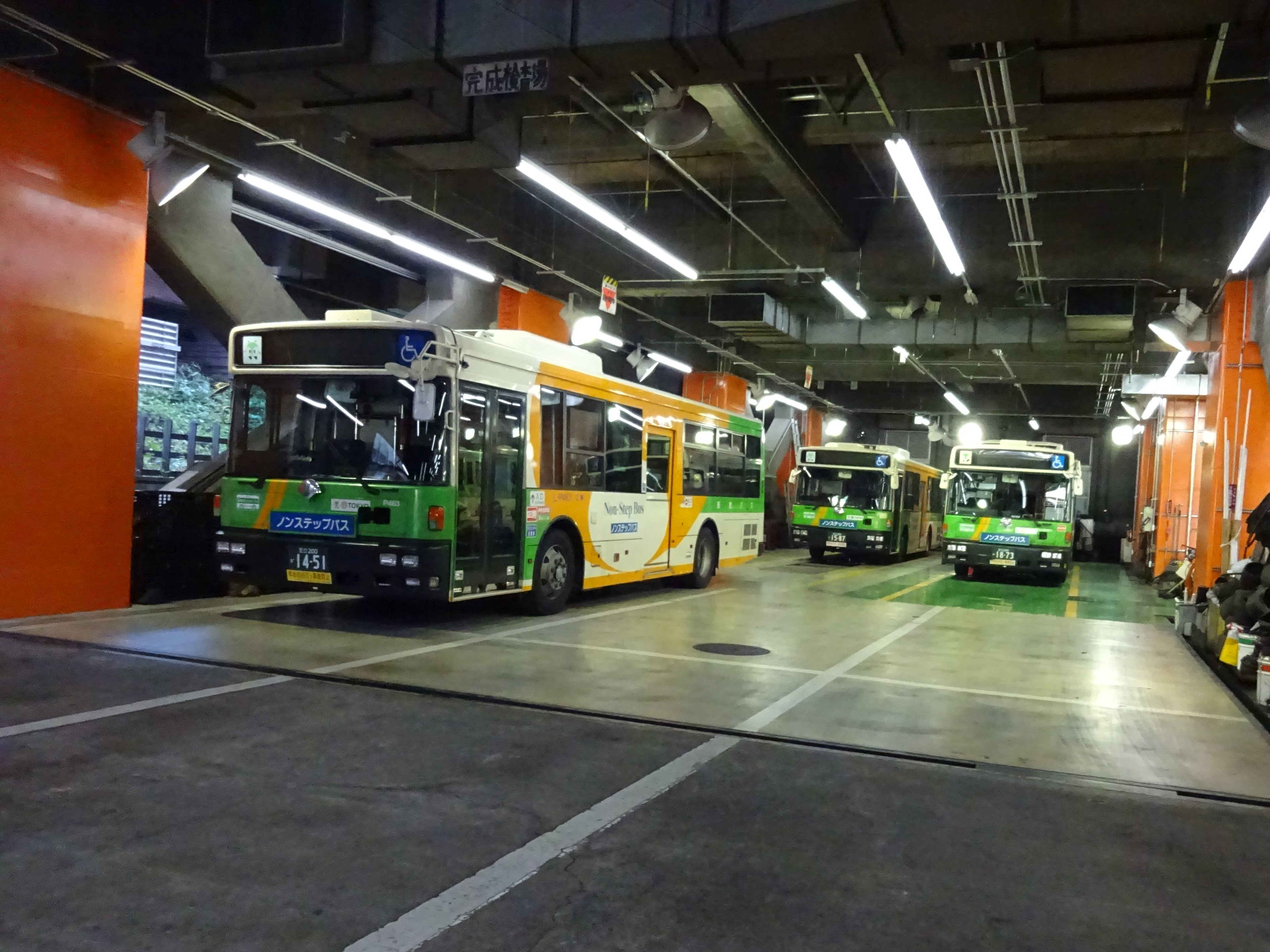 江東車庫の奥はこうなっています。